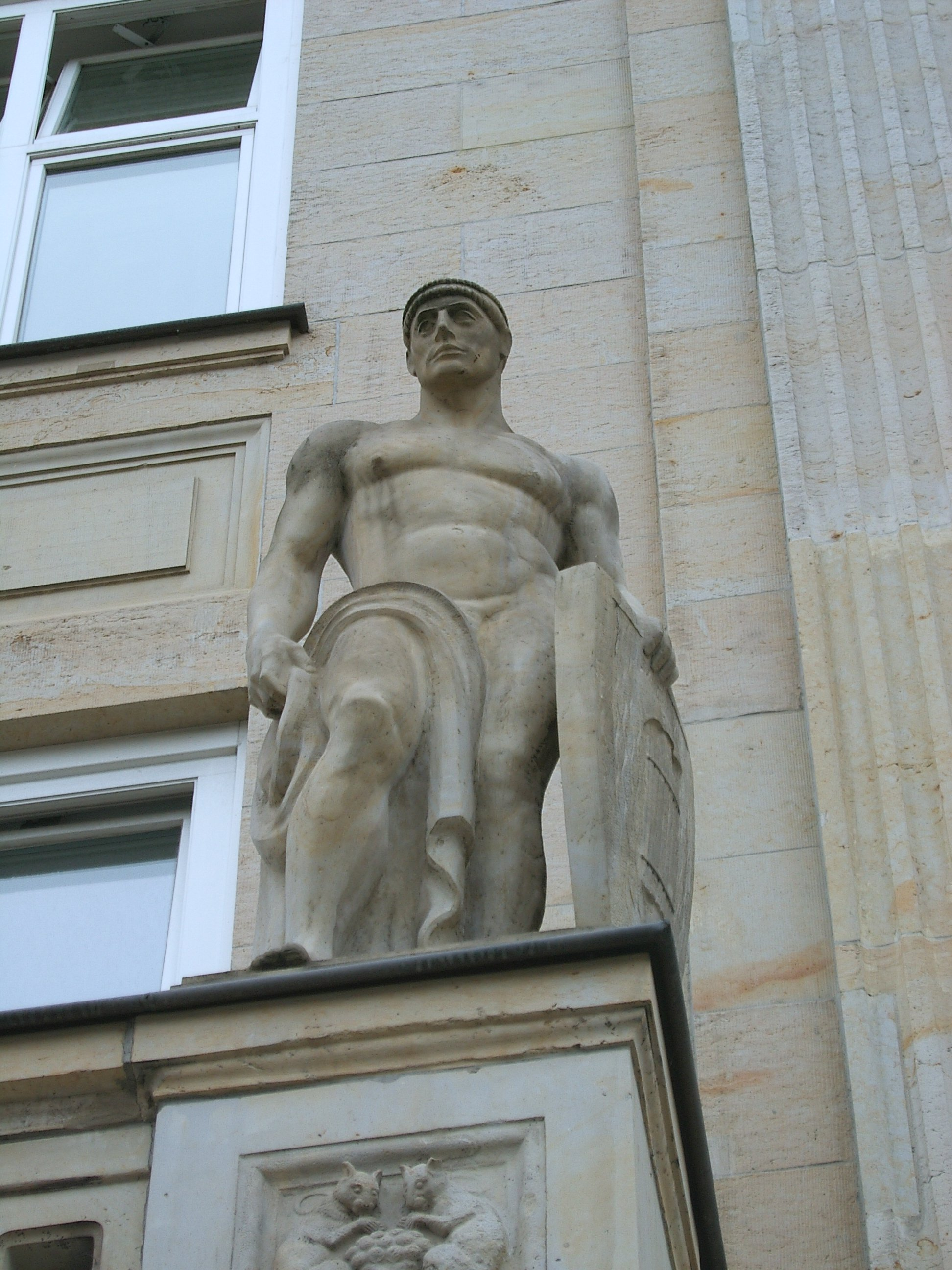 Hamburg, Neustadt, Stadthaus